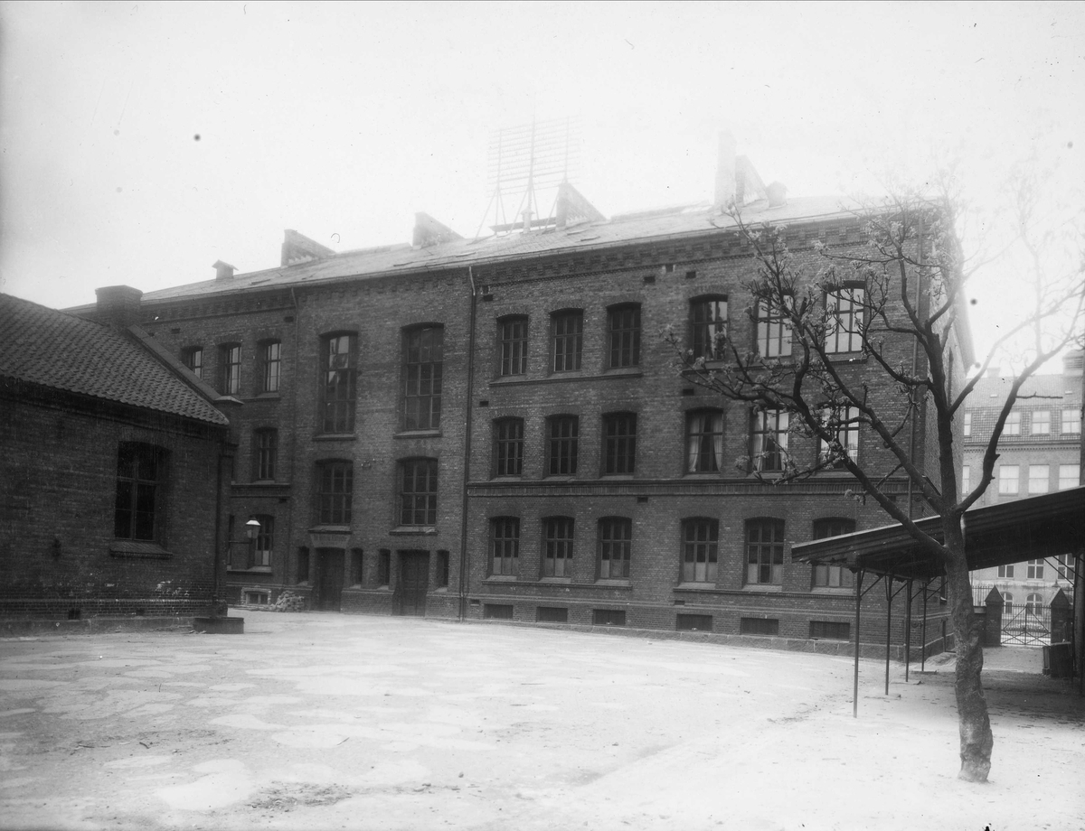 Vaterland skole fotografert ca. 1910, revet 1971